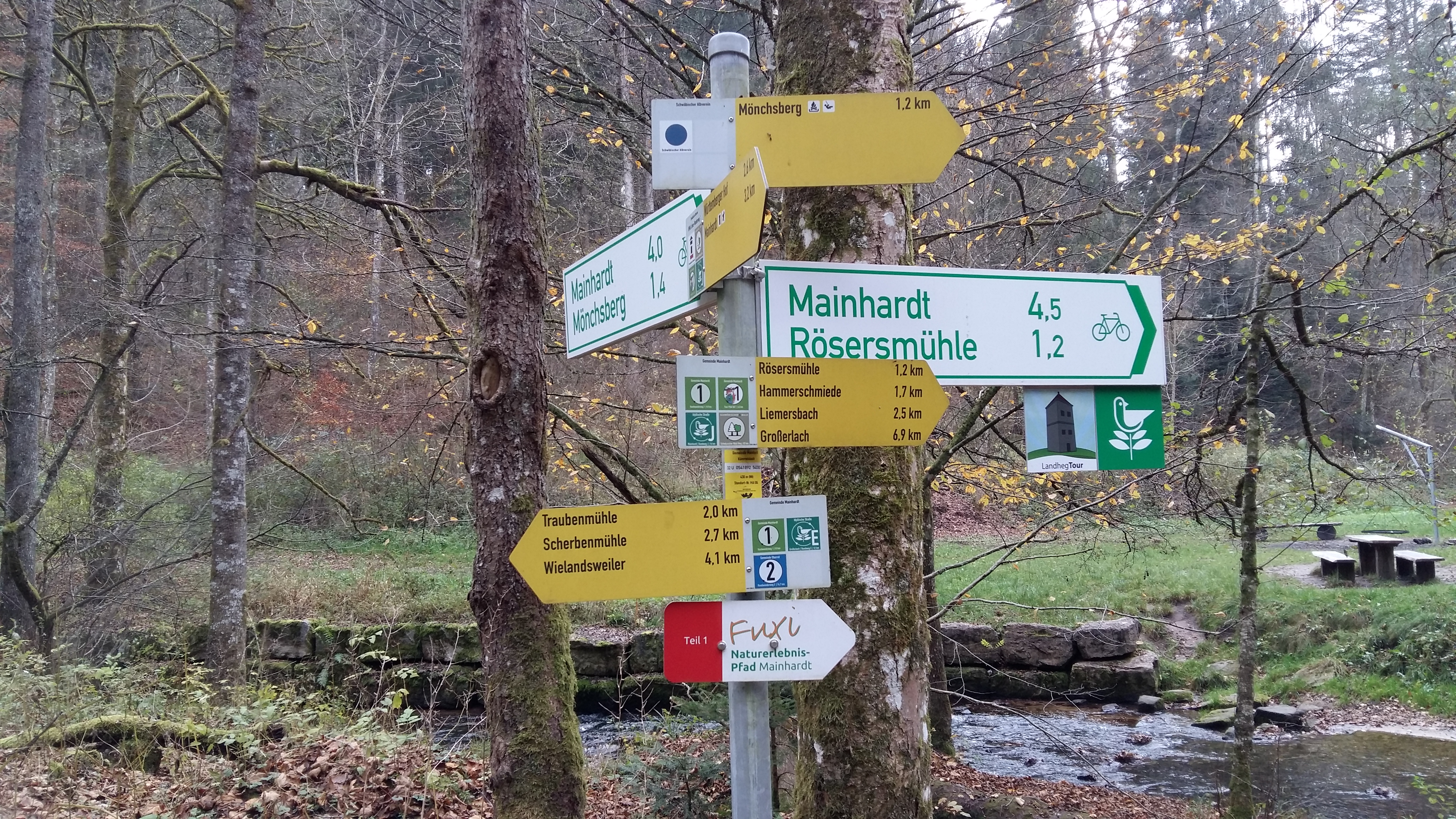 Circuits thématiques et pédagogiques de la forêt de Mainhardt, vallée de la Rot, Hankertsmühle